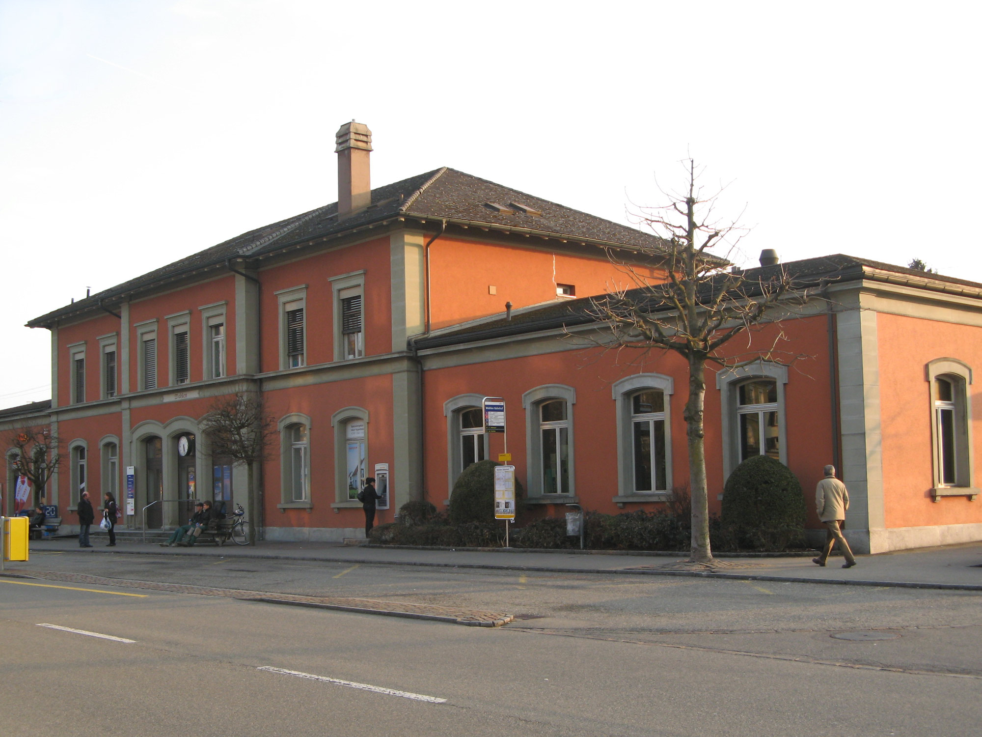 Bahnhof Wohlen